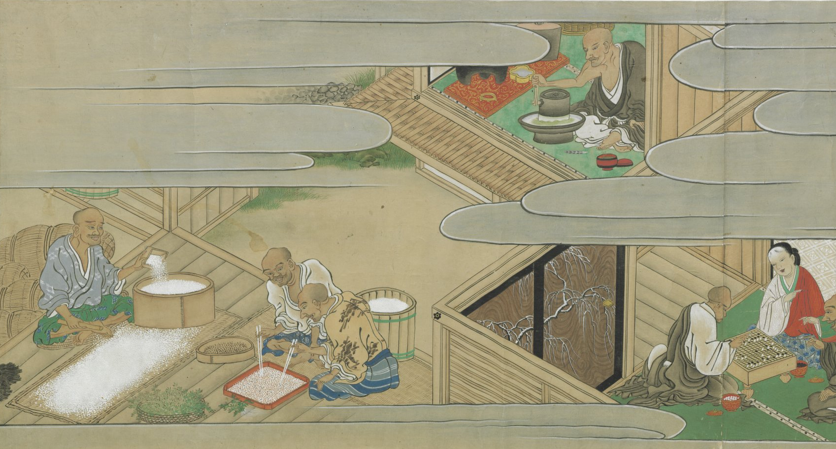 Scène 1 : tri du riz et préparation du thé pour le banquet à venir